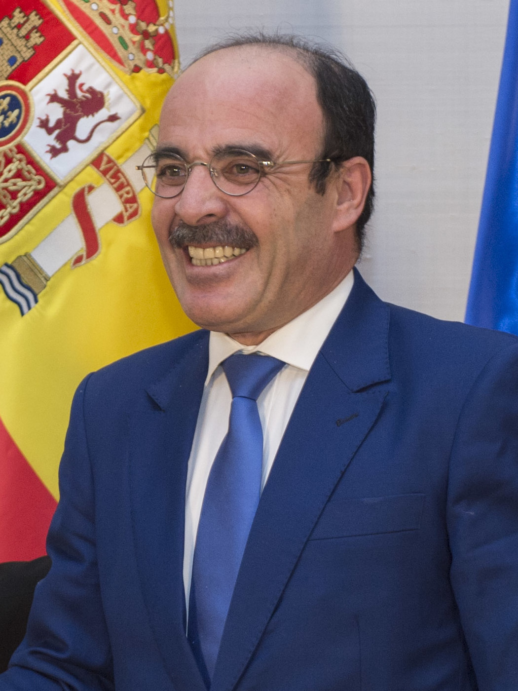 18.01.09 Audiencia Presidente Región de Tetuán.... 1